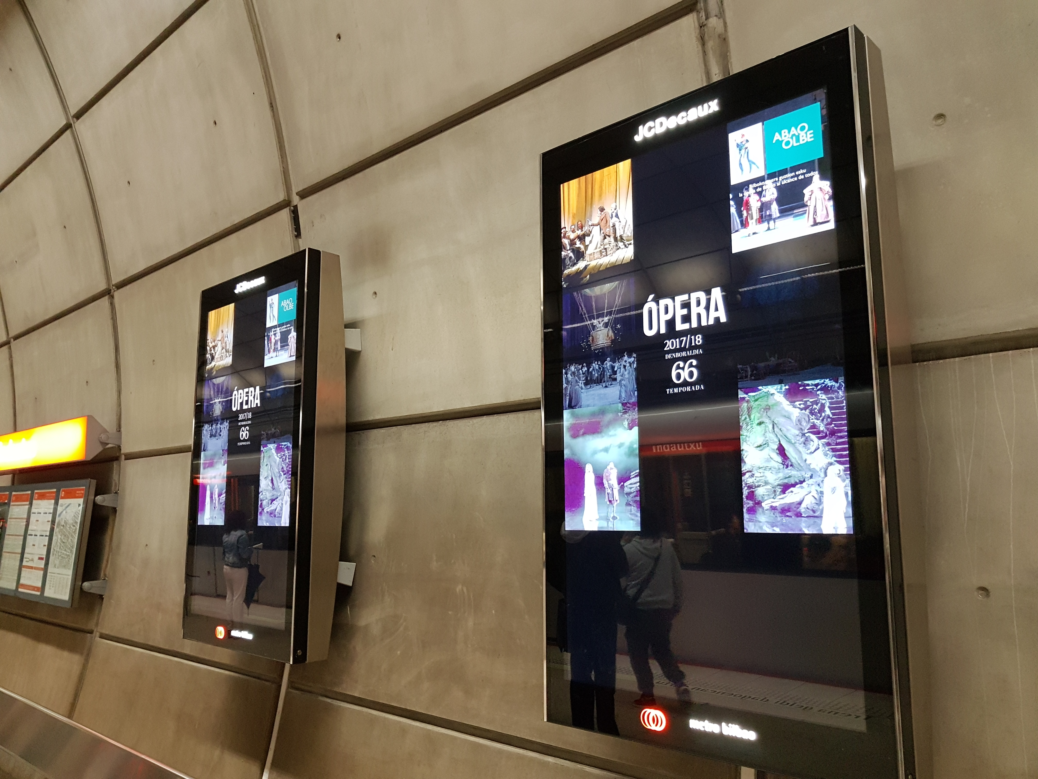 Dos de las ocho nuevas pantallas Full HD por estación.